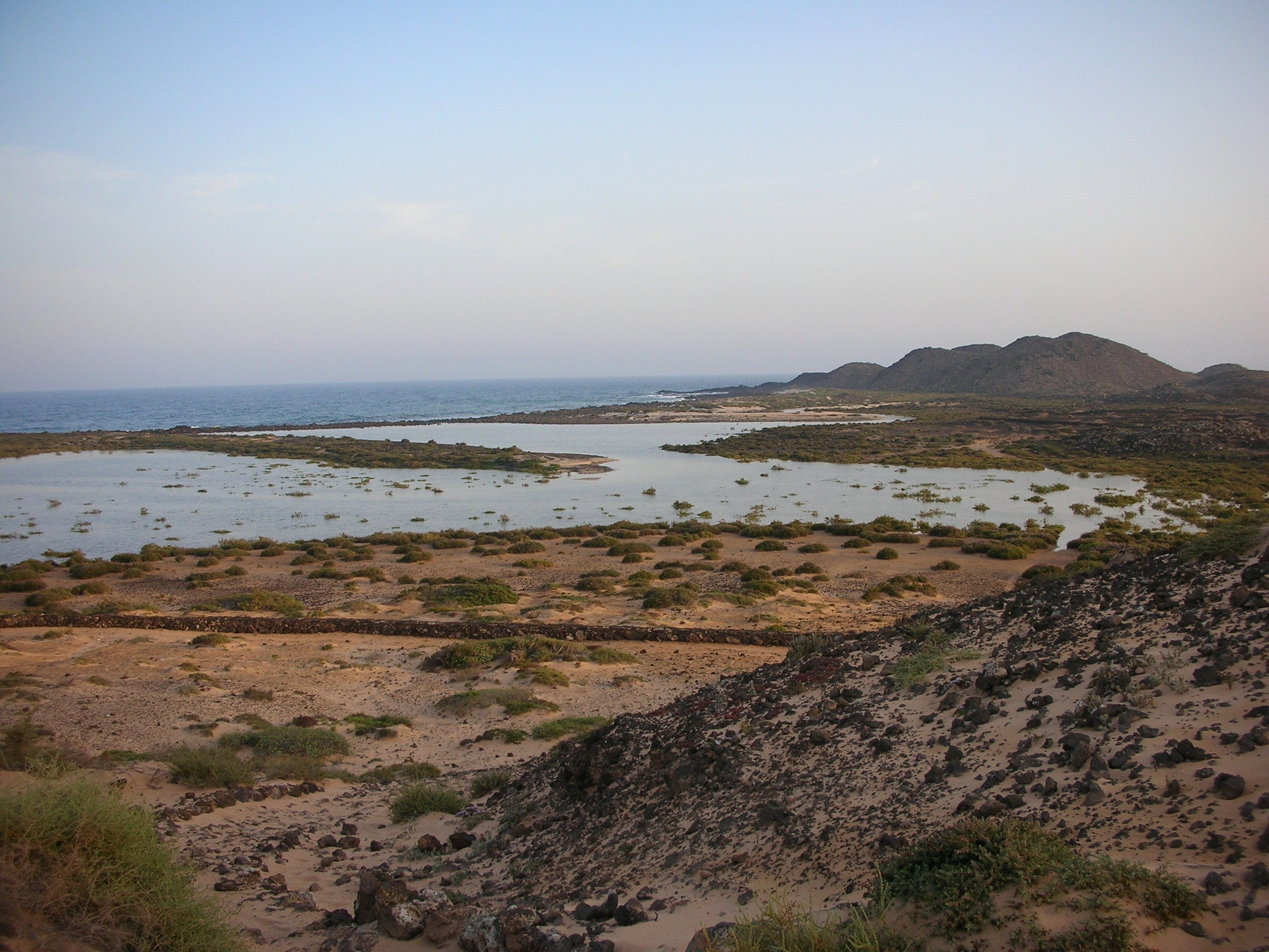 Lobos Island small lagoon